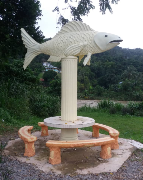 Patung ikan air tawar Tamparuli